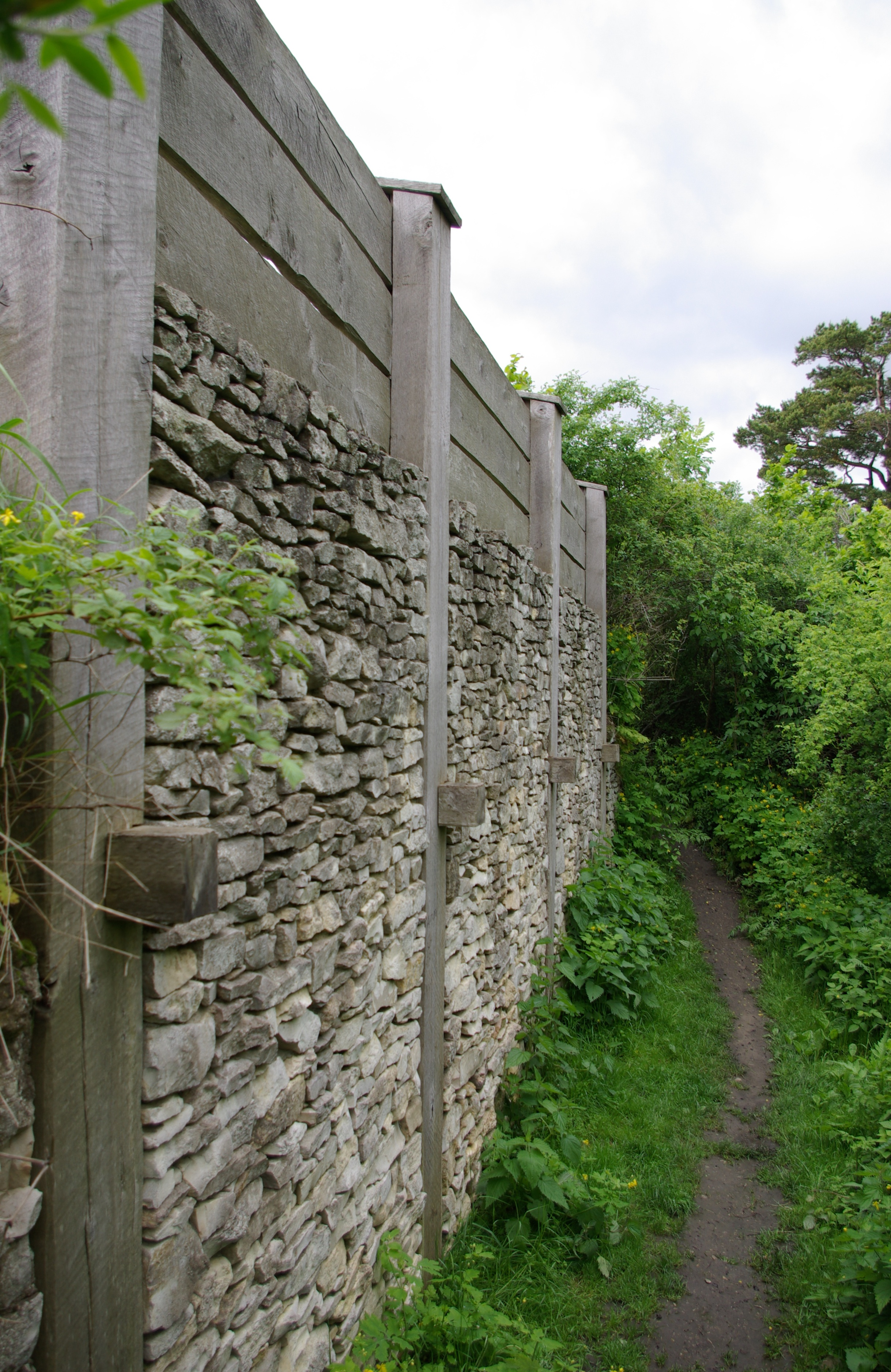 Rekonstruktion einer Keltischen Pfostenschlitzmauer aus der späten La-Tène-Zeit auf dem Staffelberg. Die Mauer ist aus Originalsteinen errichtet, ursprünglich war diese jedoch nicht gemörtelt. Die Pfosten stehen in den antiken Pfostenlöchern, sie stützen die Mauersegmente und werden ihrerseits durch die unter der rückwärtigen Rampe liegenden Anker gehalten. Zwischen ca. 130 bis 30 v. Chr. befand sich auf dem Staffelberg das Keltische Oppidum Menosgada, bestehend aus einer Burg mit doppelter Steinmauer auf dem Hochplateau sowie einer Stadtanlage mit Steinmauer und Holzerdemauer auf dem unteren Plateau. (Informationen des Bayerischen Landesamtes für Denkmalpflege, Archäologische Außenstelle für Oberfranken)